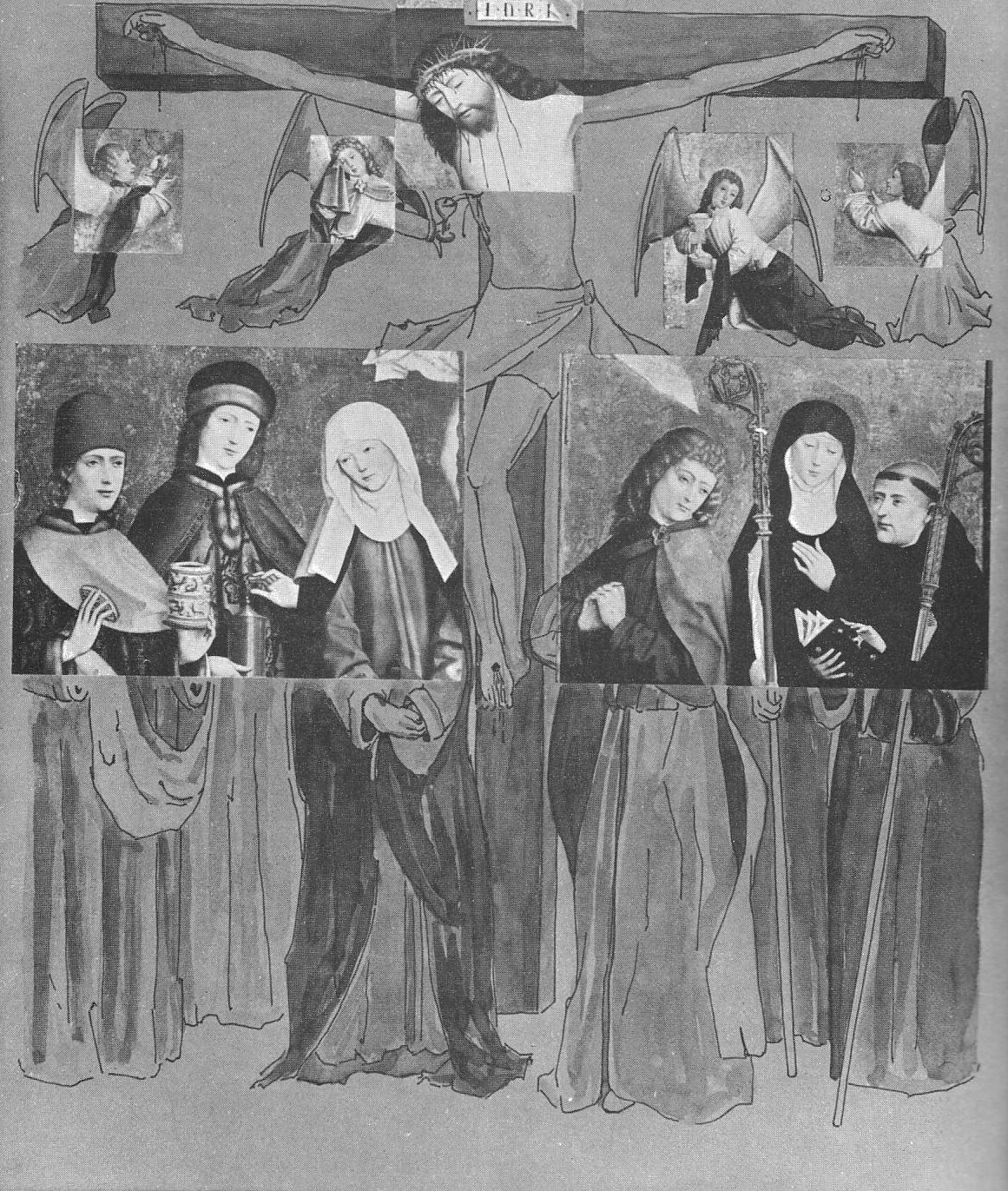 Rekonstruktion des Liesborner Hauptaltarbildes nach Pieper